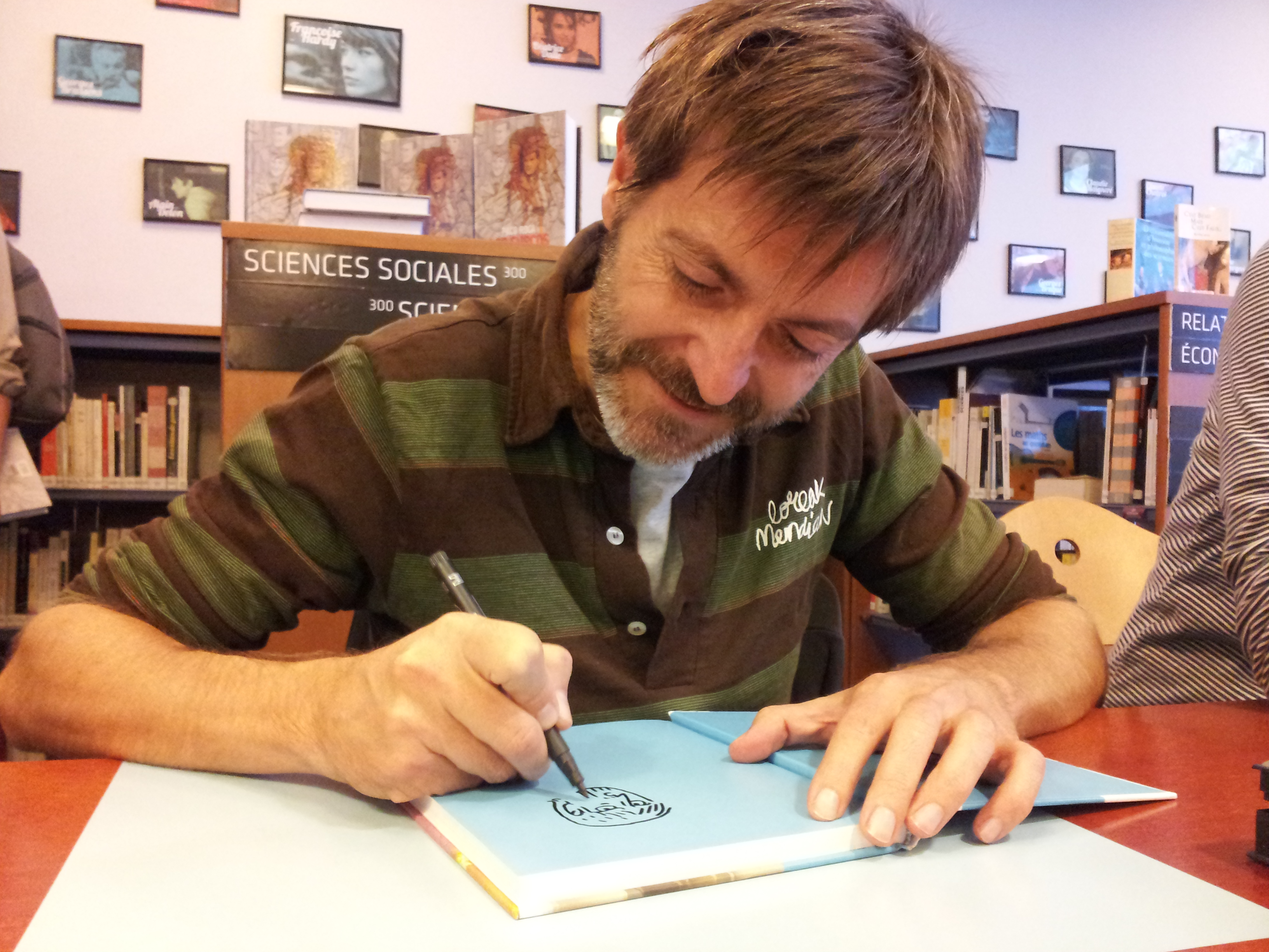 Dibuixant "un hombre en pijama".